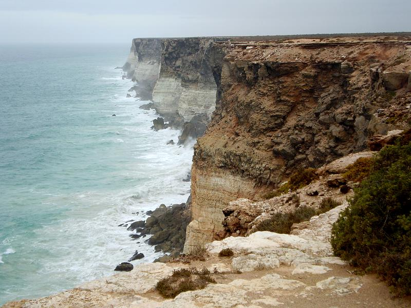 Nullarbor Cliffs